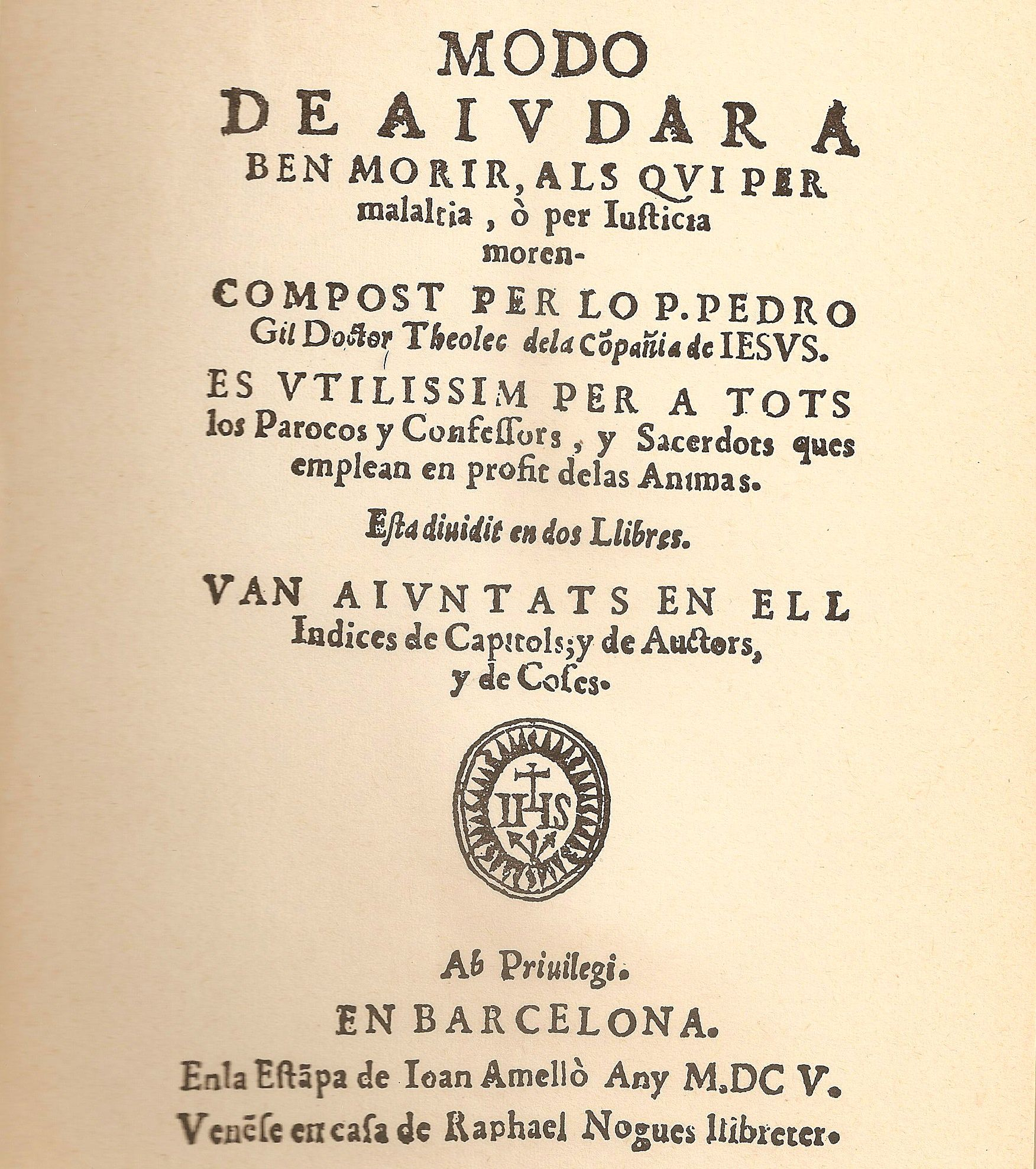 Portada del llibre Modo de Aiudar a ben morir... de Pere Gil, publicada a Barcelona l'any 1605